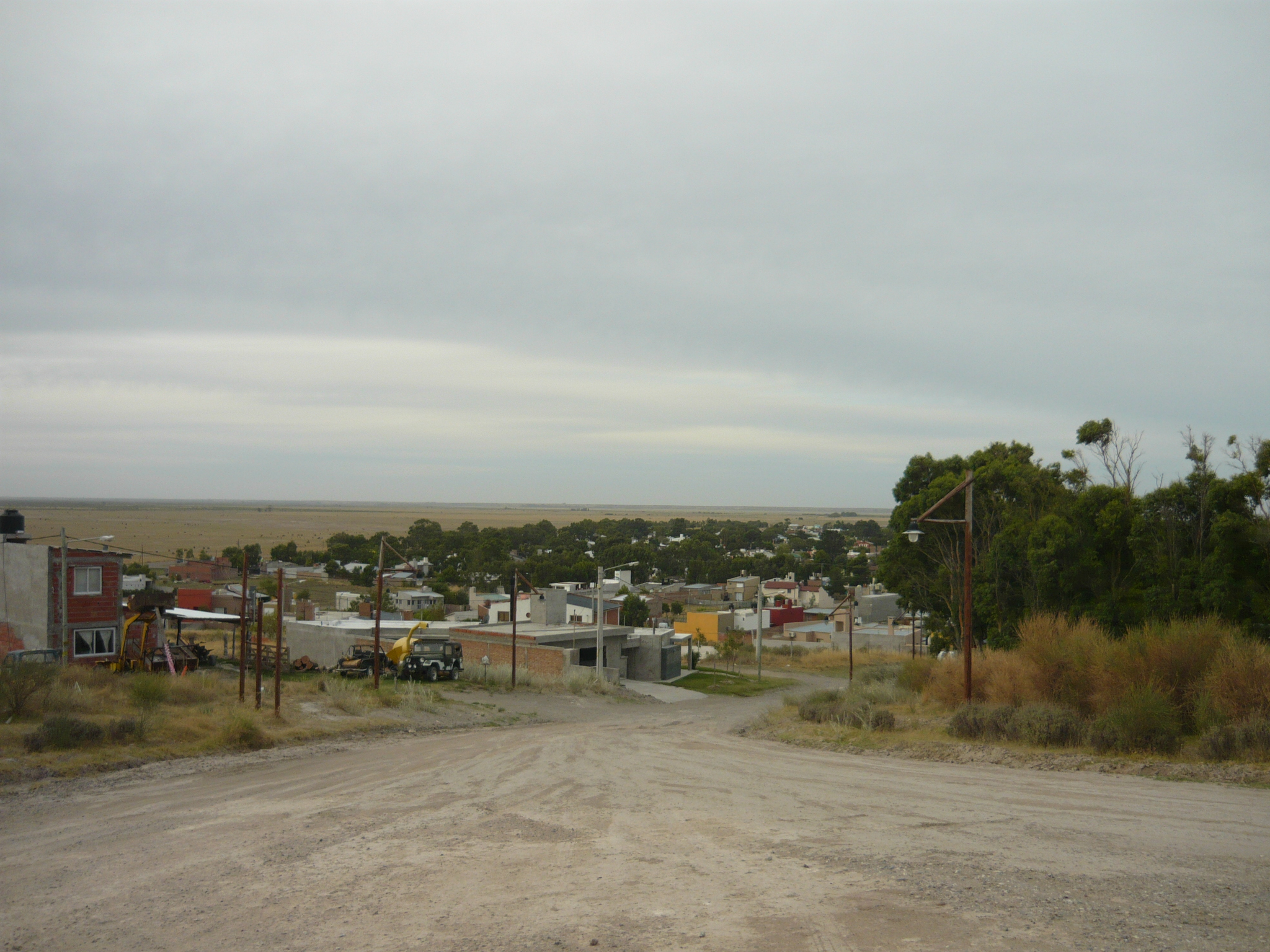 Vista del Balneario El Cóndor